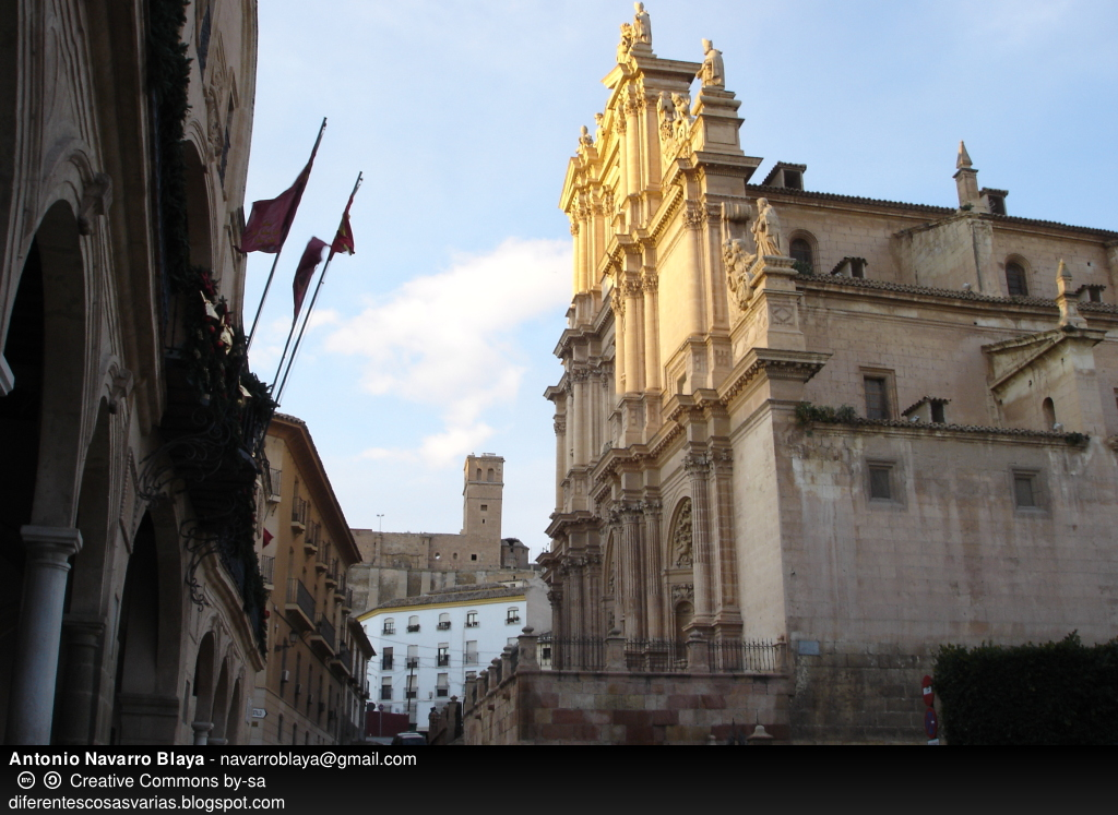 Vista de la fachada de San Patricio con el ayuntamiento de Lorca a la izquierda.